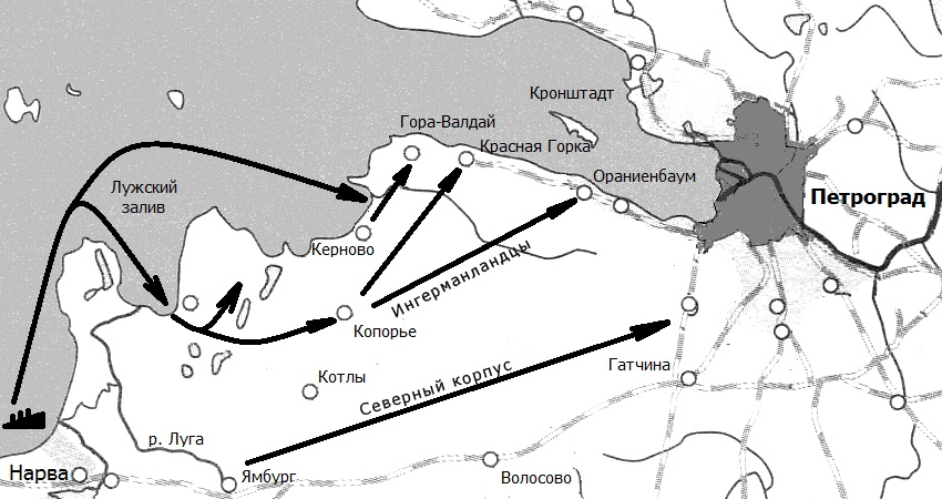 Свободная замена схемы наступления на Петроград Западно-Ингерманландского полка весной-летом 1919 года